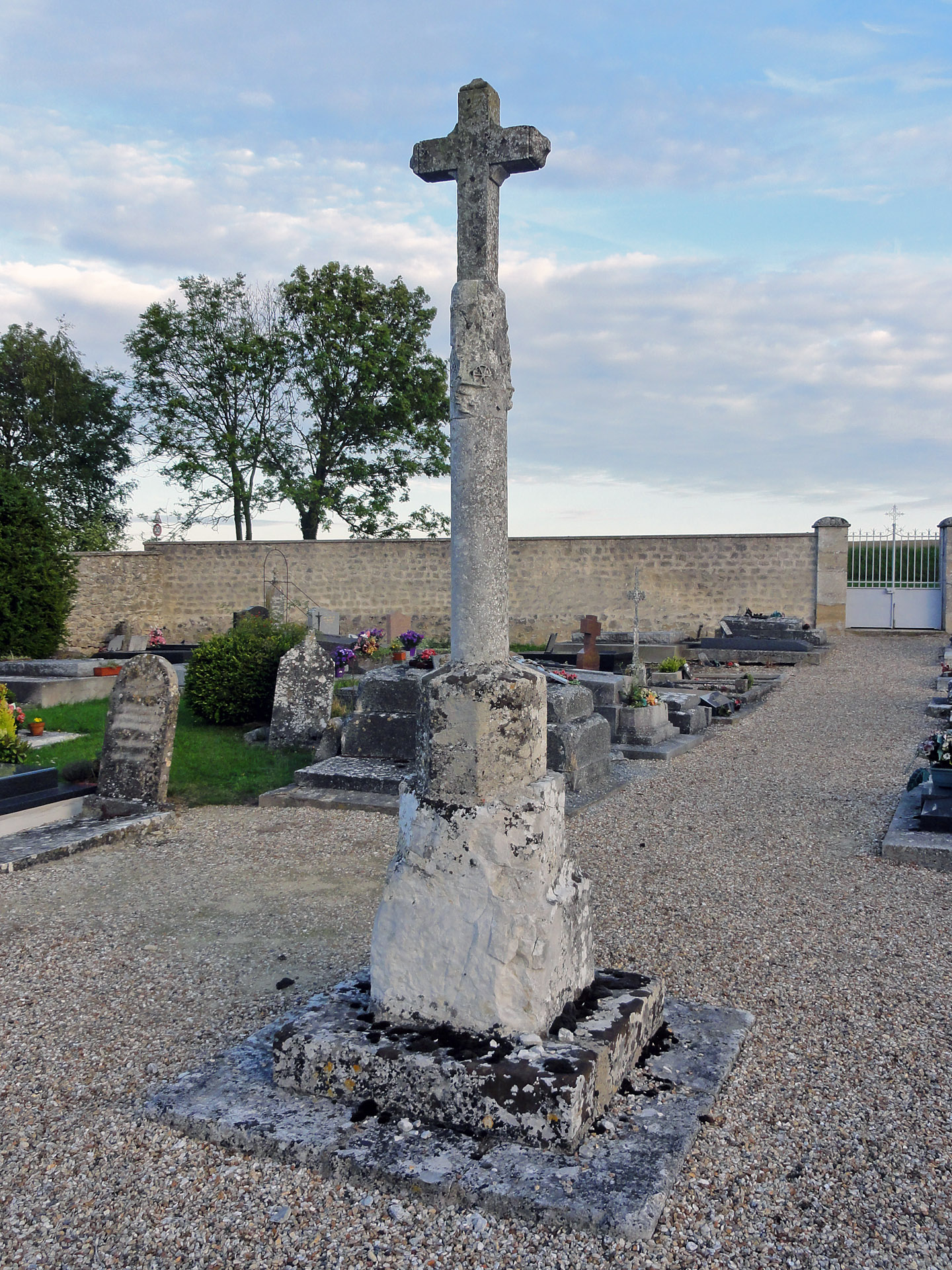 Calvaire du cimetière de Chérence, Val-d'Oise, France.